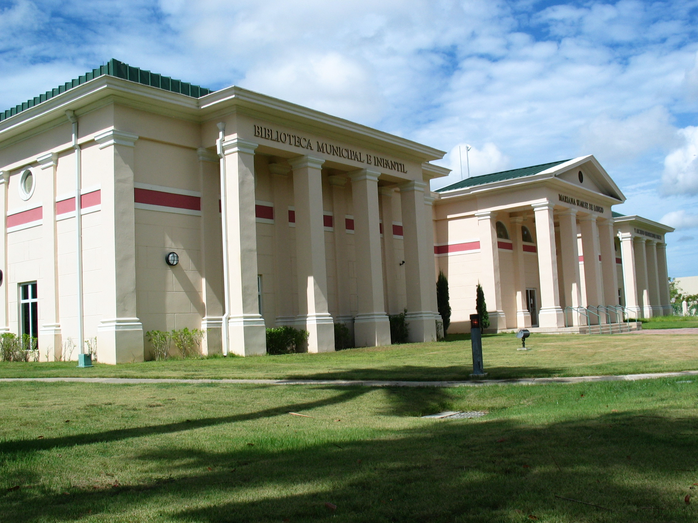 The Biblioteca Municipal e Infantil Mariana Suárez de Longo y Archivo Histórico de Ponce (Mariana Suárez de Longo Municipal and Children’s Library and Ponce Historical Archive) on Barrio San Anton in Ponce, Puerto Rico.